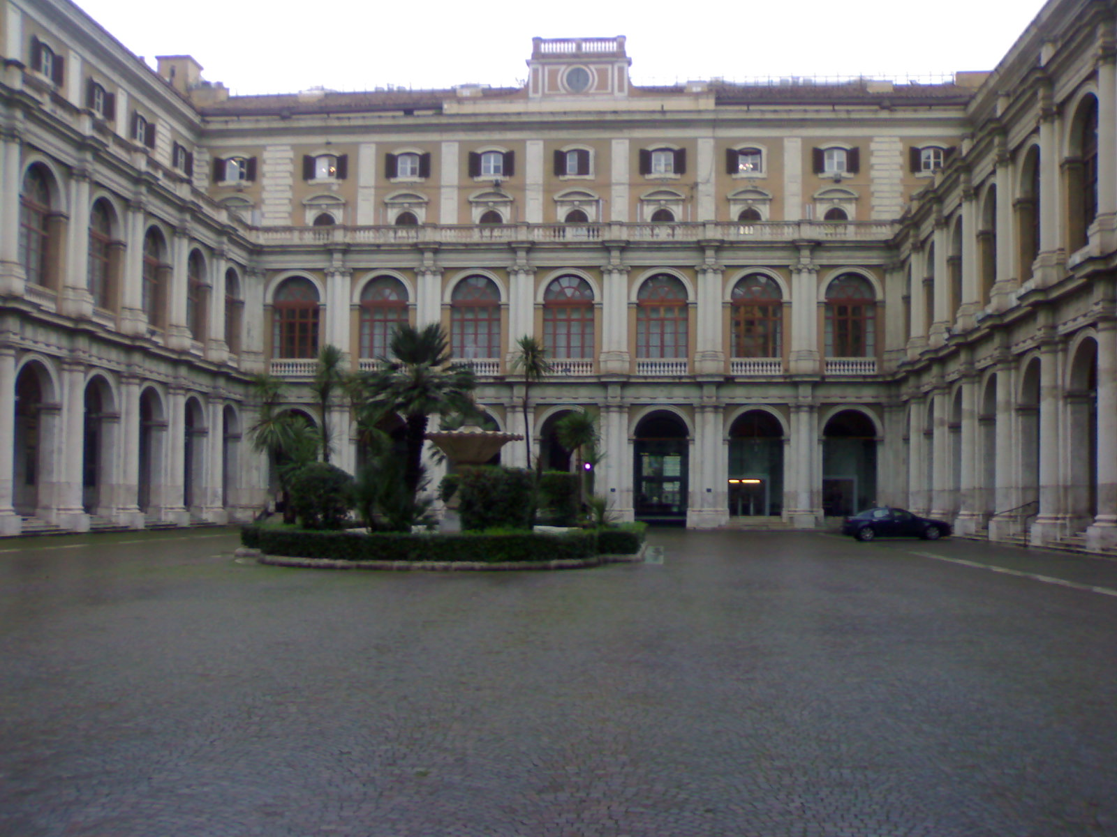 Cortile interno del Palazzo delle Finanze, via XX settembre, Roma